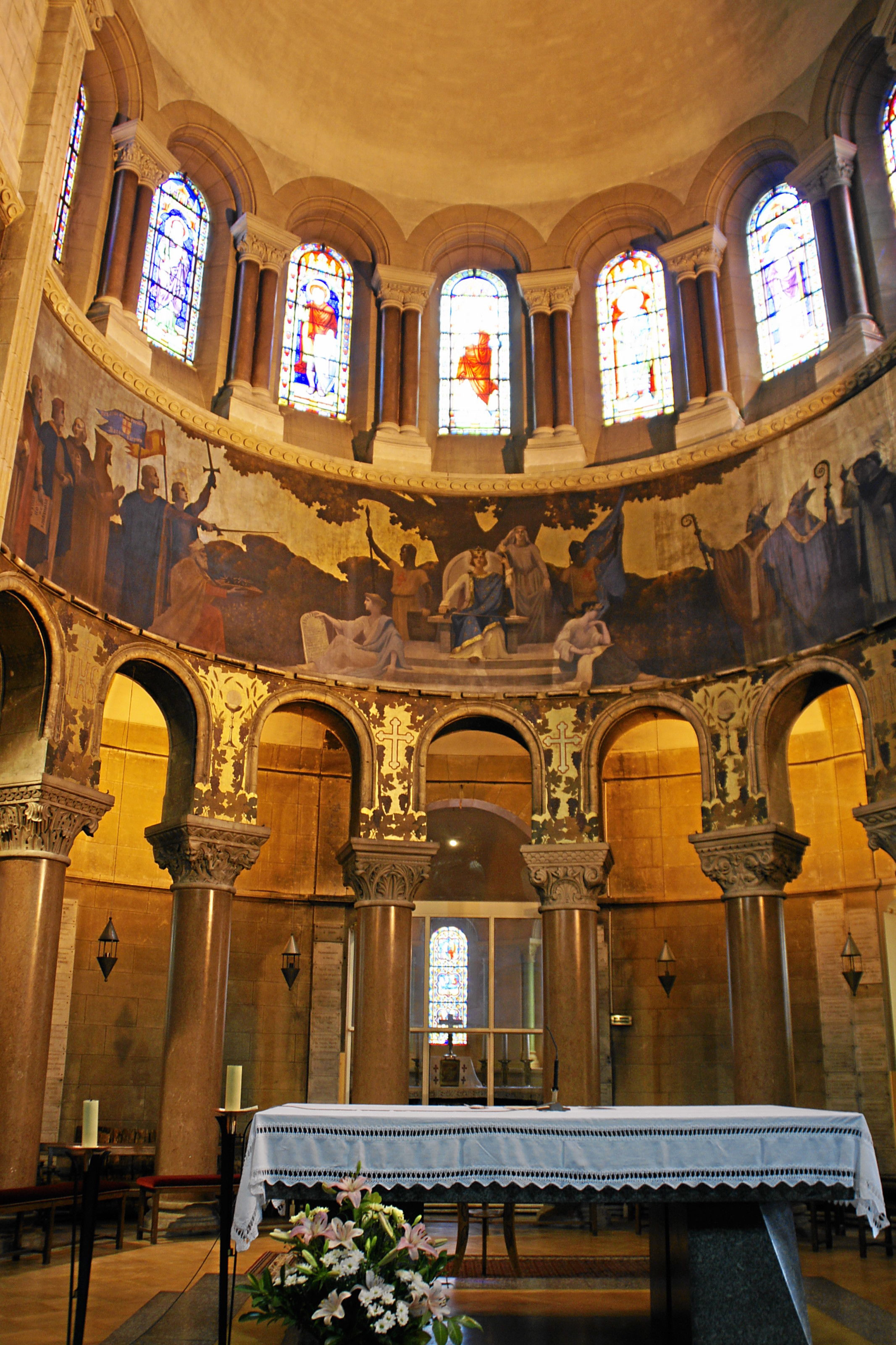 Église Saint-Louis de Vichy: Chor mit den Glasfenstern